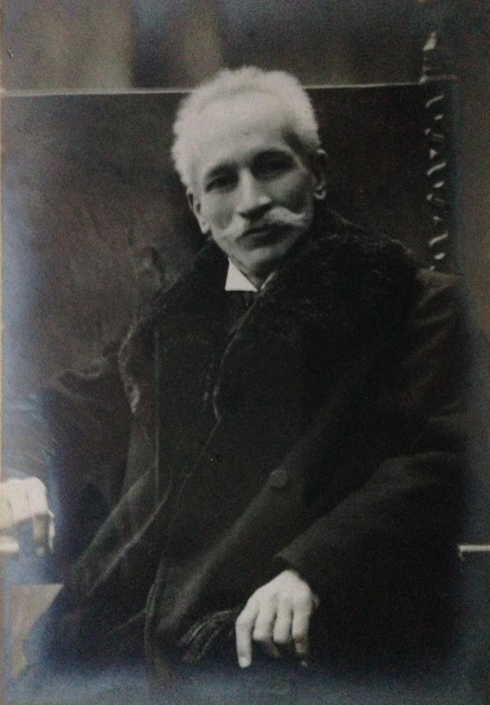 Foto